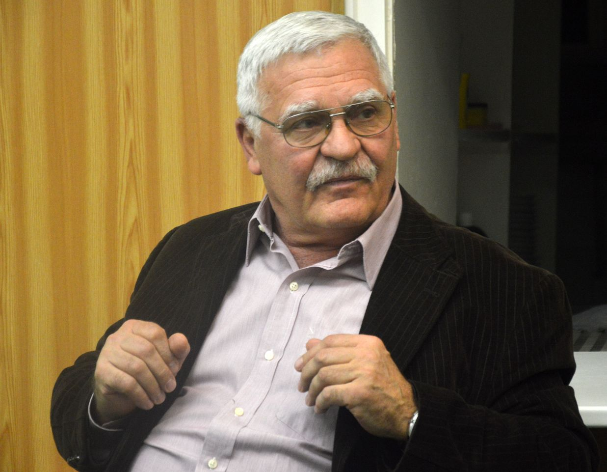 Bodnár András olimpiai bajnok vízilabdázó